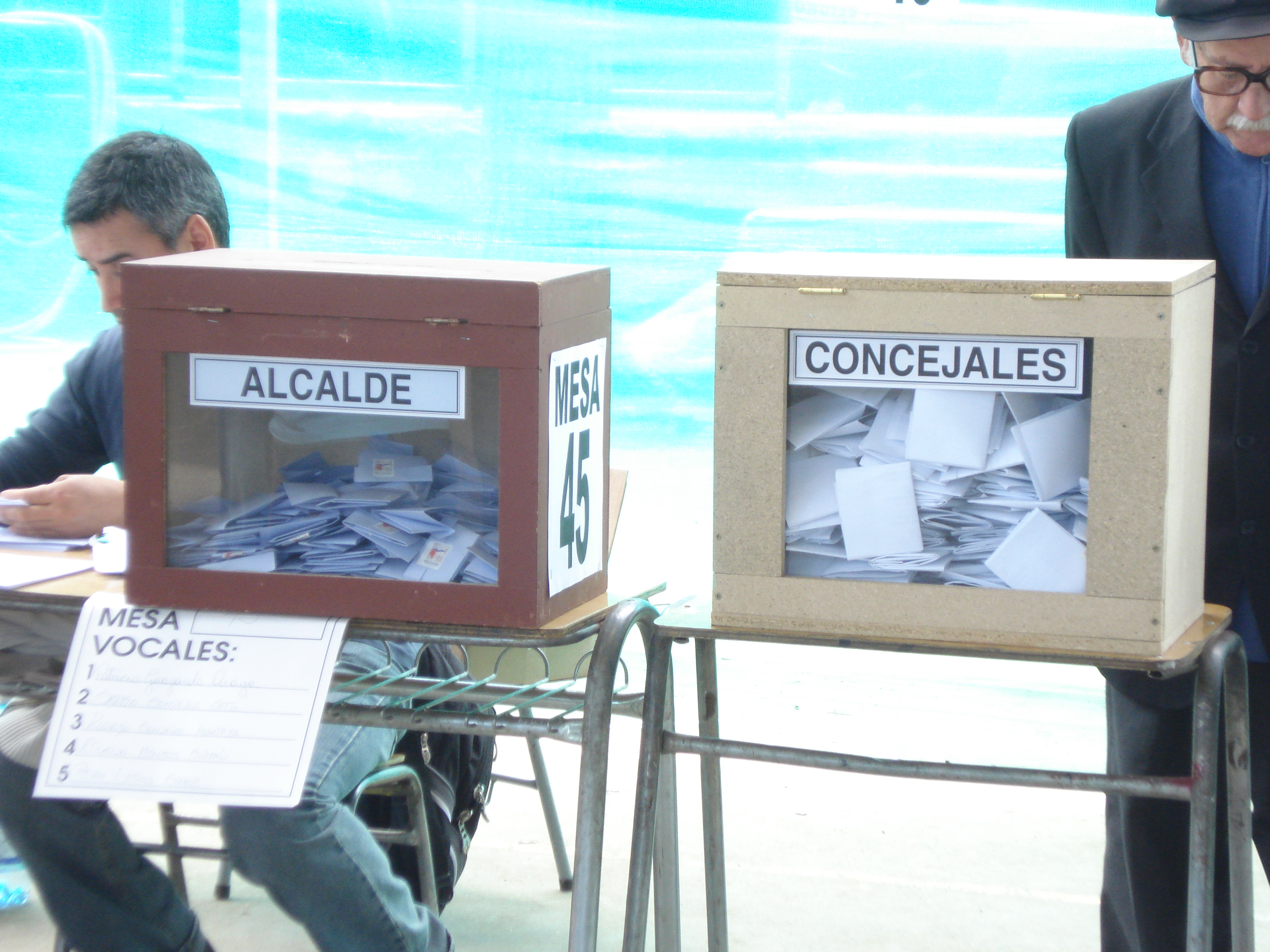 Urna de votos para Alcaldes y Concejales en las elecciones municipales de Chile del 26 de octubre de 2008. Centro Educacional Eduardo de la Barra, Peñalolén.